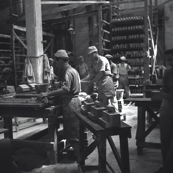 בית חרושת ללבנים "נעמן" בעמק-זבולון